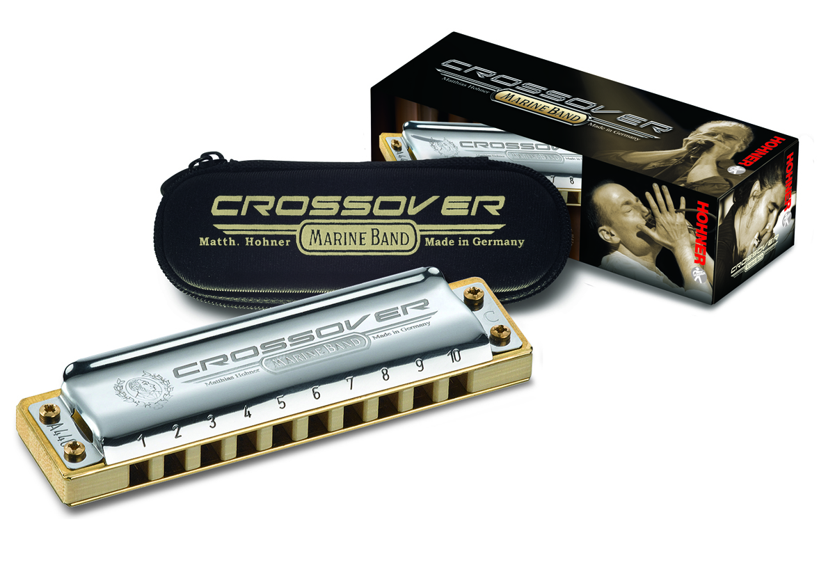 Bluesharp-Modell Marine Band Crossover